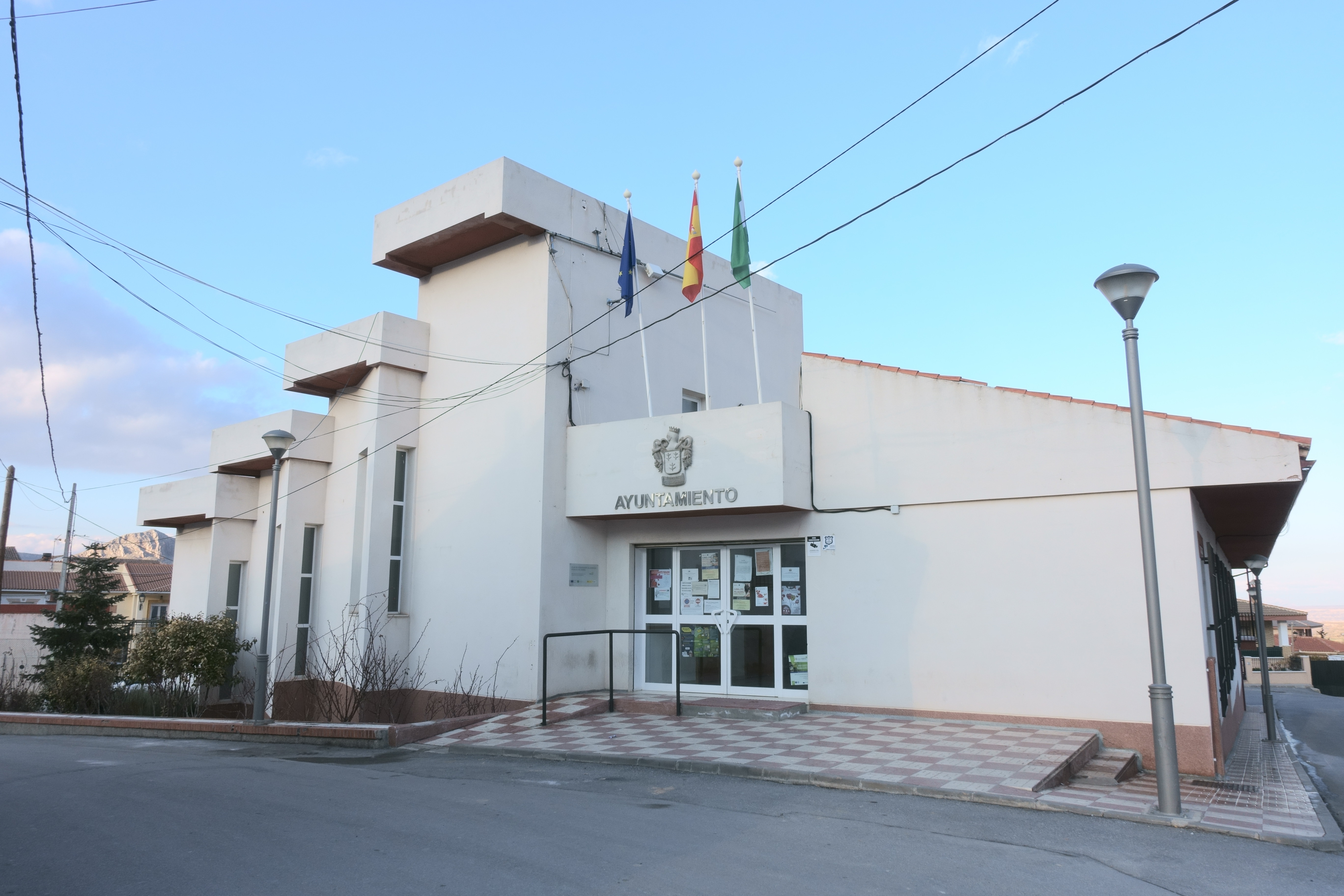 Casa consistorial de Darro (Granada, España).